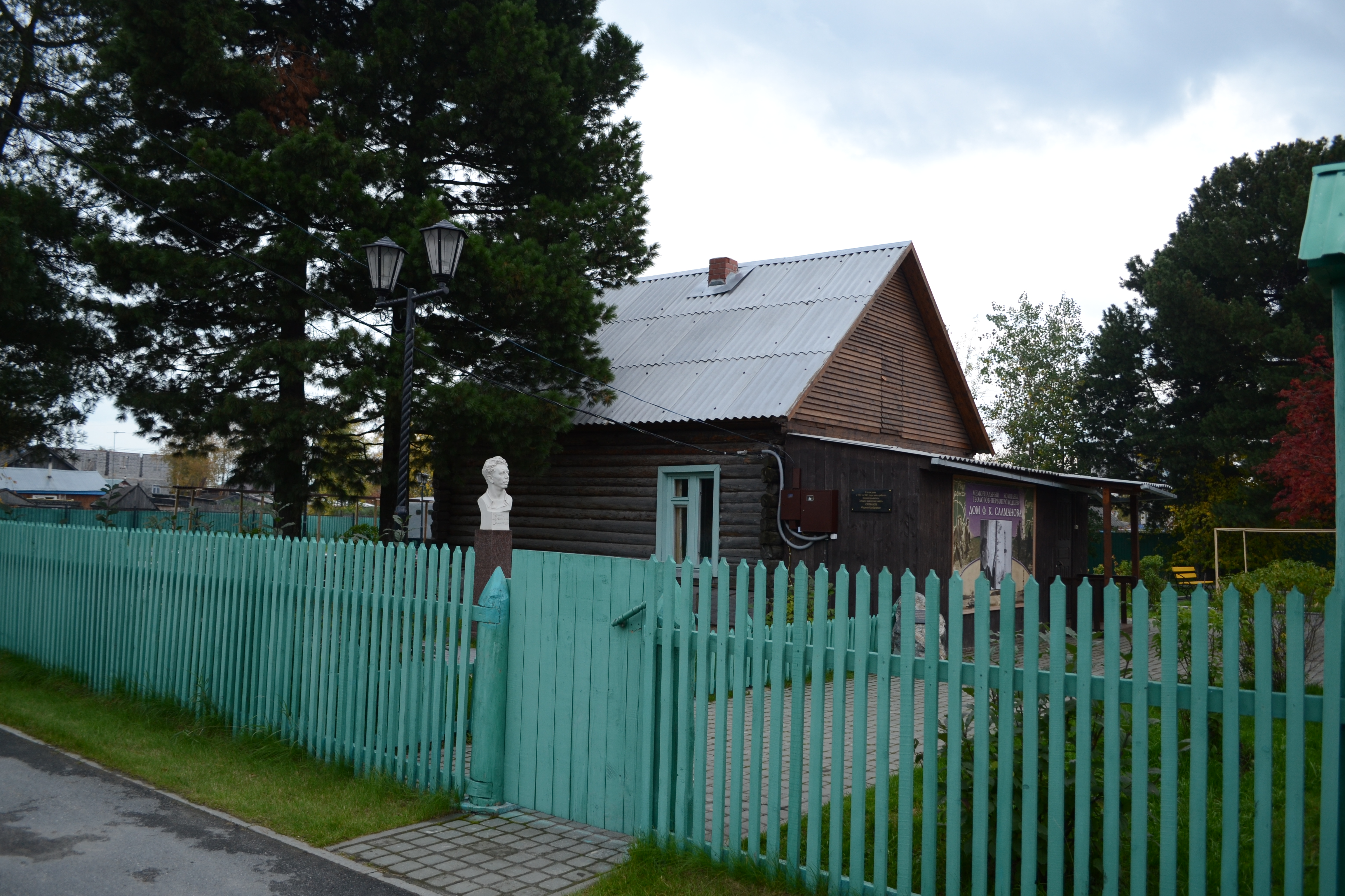 Дом, в котором с 1957 по 1961 гг. жил советский и российский геолог, первооткрыватель нефти в Сибири Ф.К. Салманов: улица Терешковой, 49, Сургут, Ханты-Мансийский автономный округ